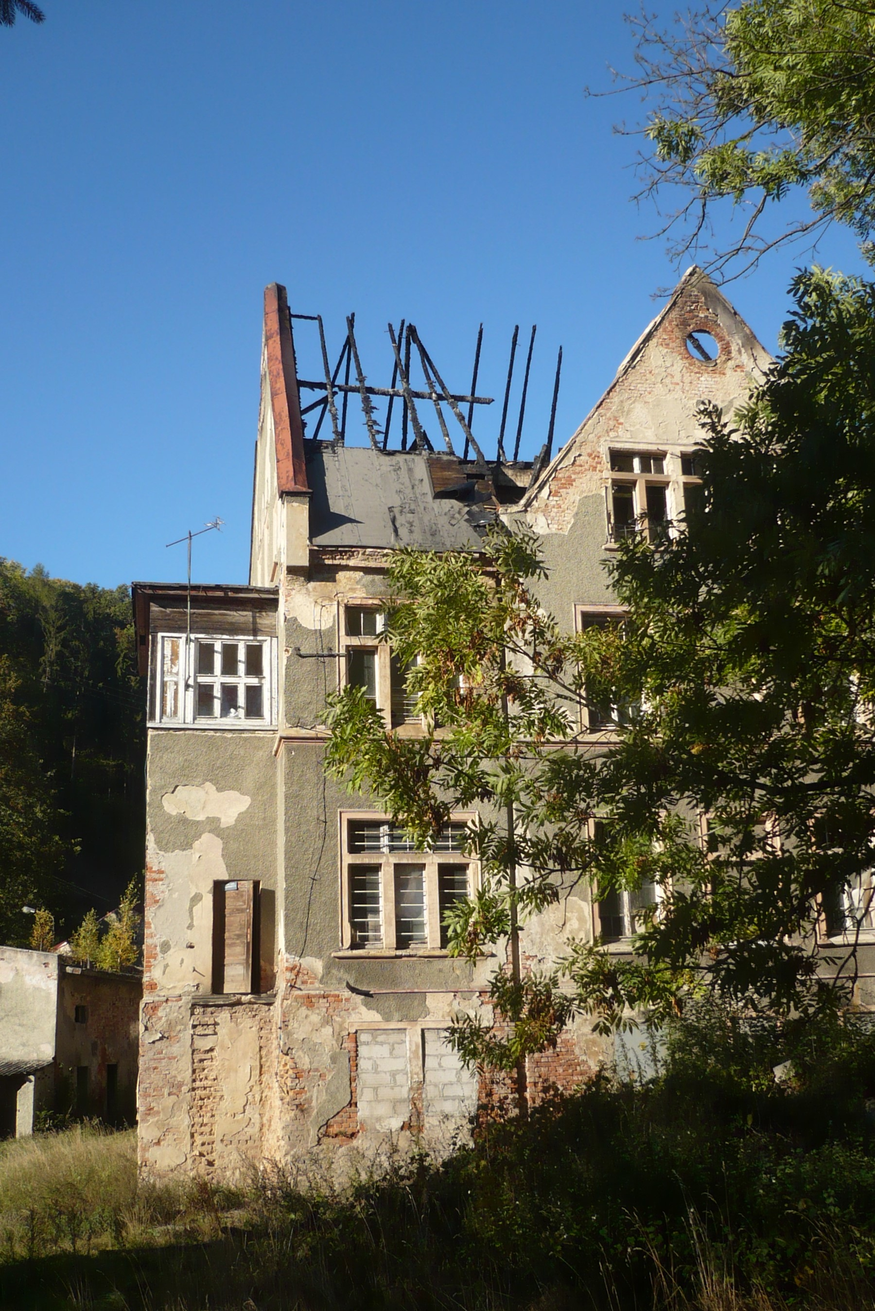 Szpital miejski w Nowej Rudzie